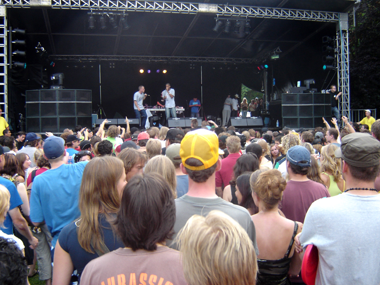 Werfpop 2005 with Opgezwolle